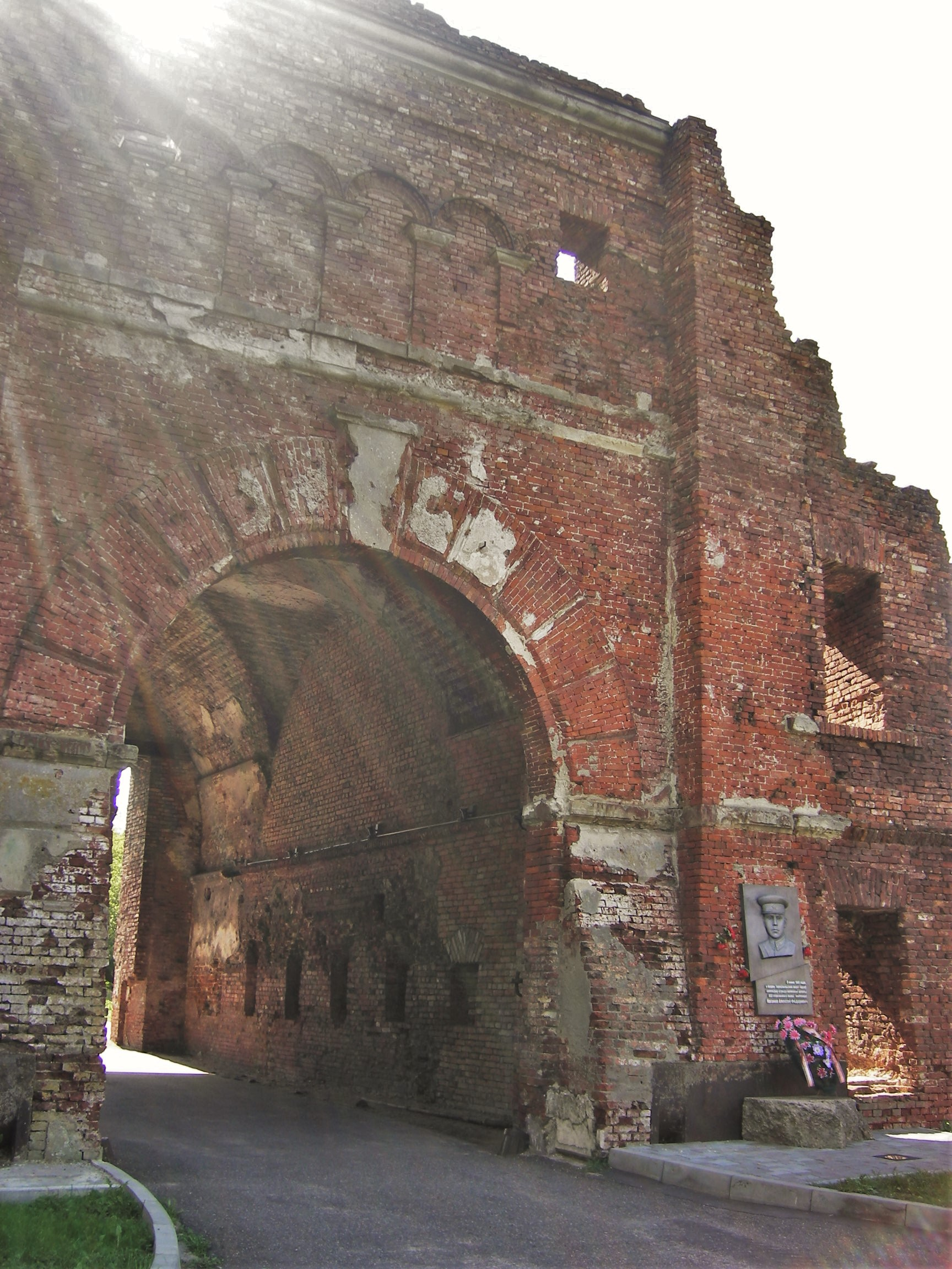 Brest Fortress, Belarus